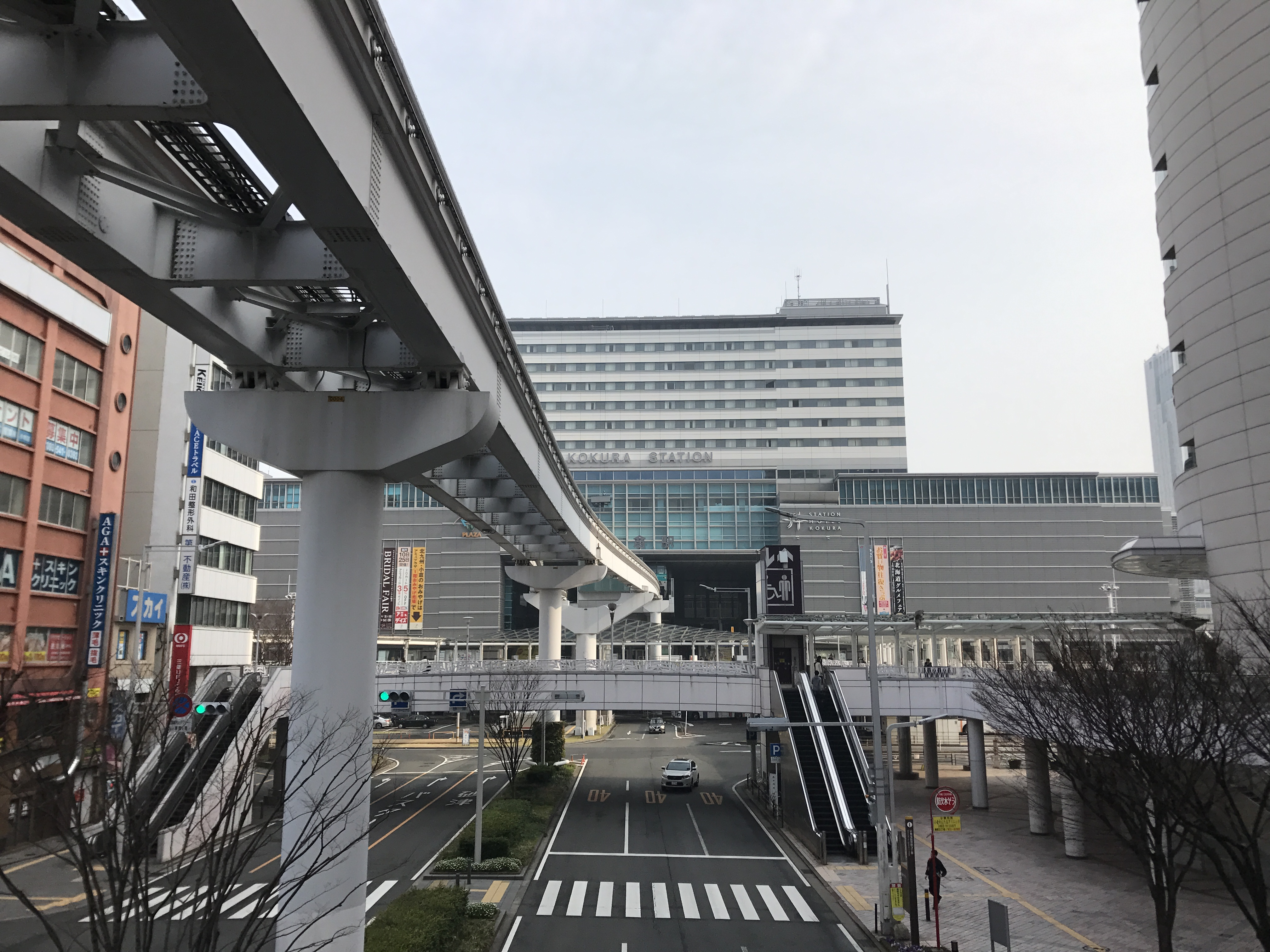 南側より望む小倉駅ビル